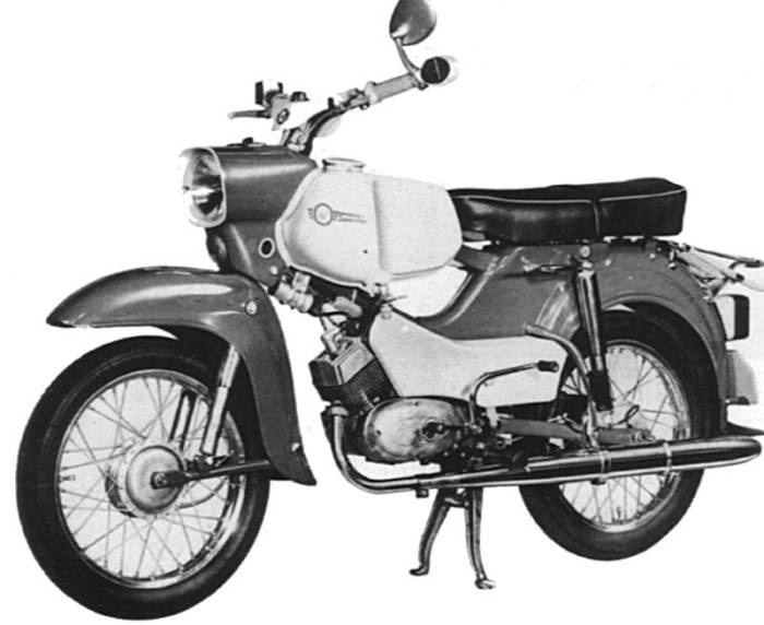 Fotografia przedstawia Simsona SR4-3 Sperber